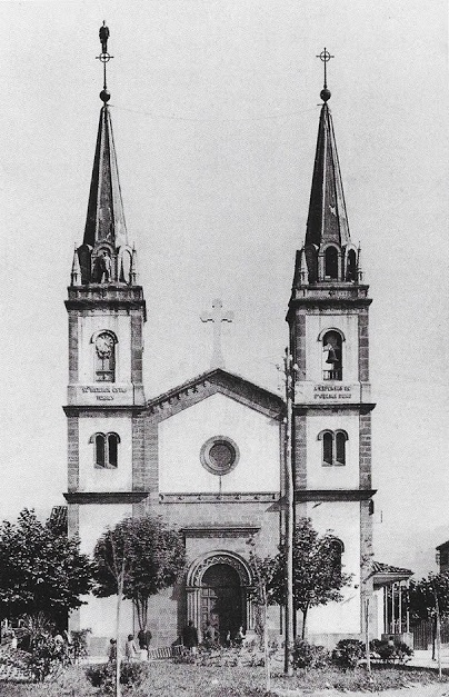 Antigua iglesia, desaparecida, de Santa Eulalia, en La Felguera (Asturias, España)